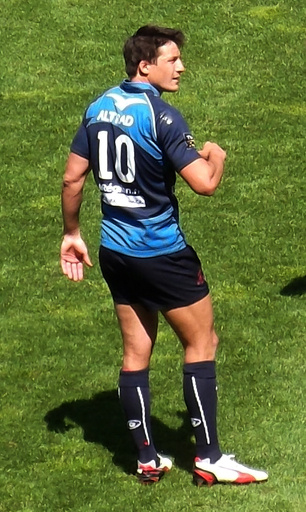 François Trinh Duc, MHR vs RM 92.